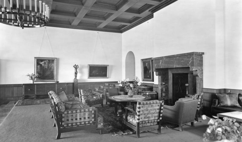 Obersalzberg Der Berghof vor der Zerstörung.